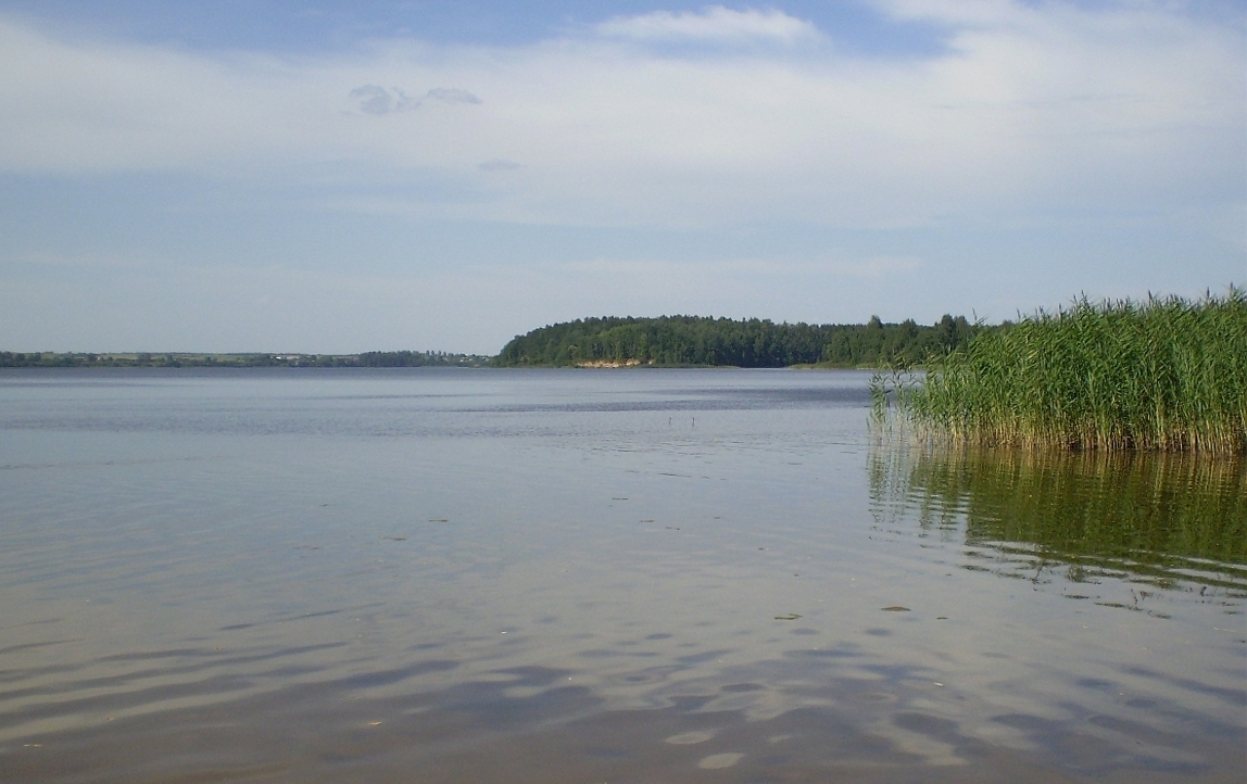 Лепельскае возера